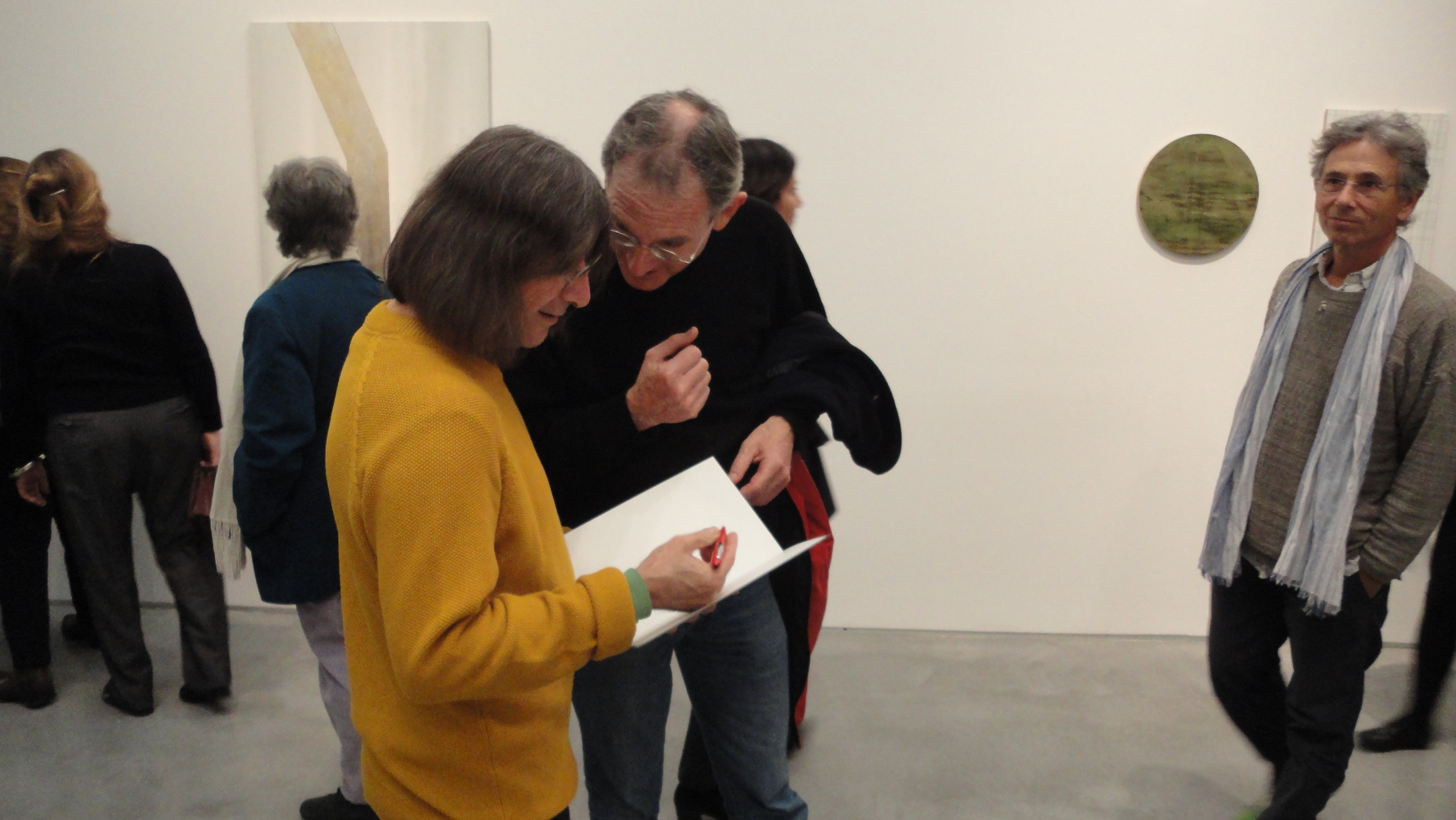 פתיחת "עונה של אמנות ישראלית" במוזיאון ישראל, ירושלים, 18 בדצמבר 2012 פתיחת תערוכות של יהשוע בורקובסקי, נלי אגסי וישראל הרשברג ותערוכת האוסף "מרחבים: רכישות חדשות ועבודות מהאוסף"